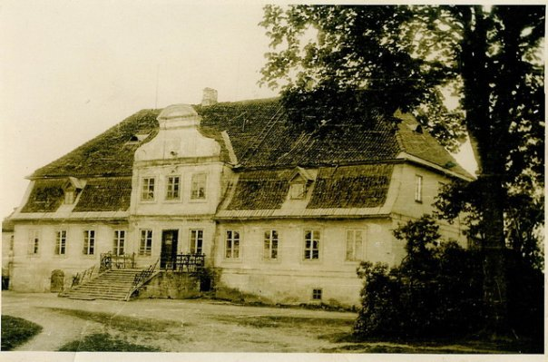 Kelmės dvaras apie 1938 m.